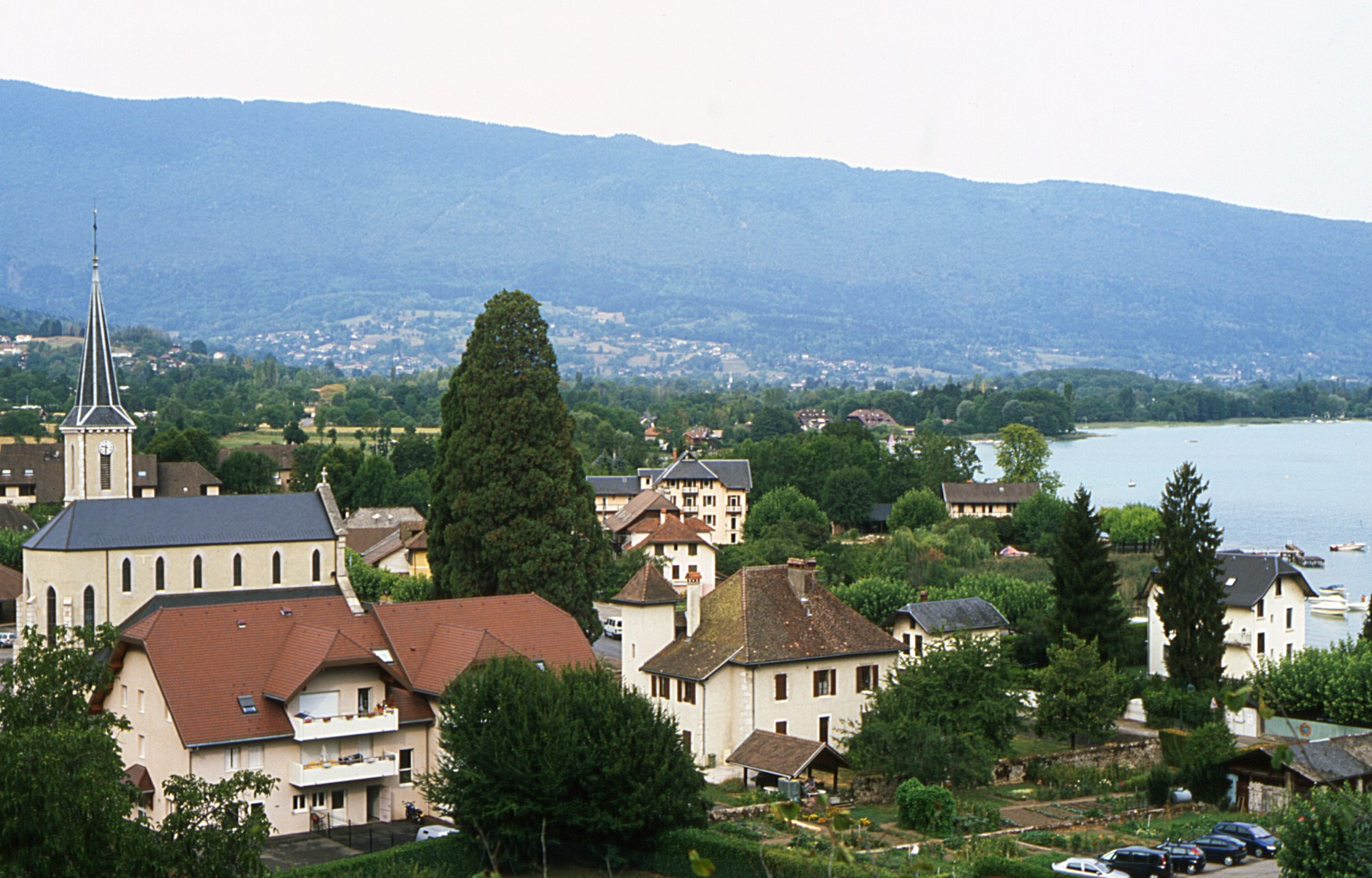 Le centre-ville de Duingt vu depuis les contreforts du Taillefer